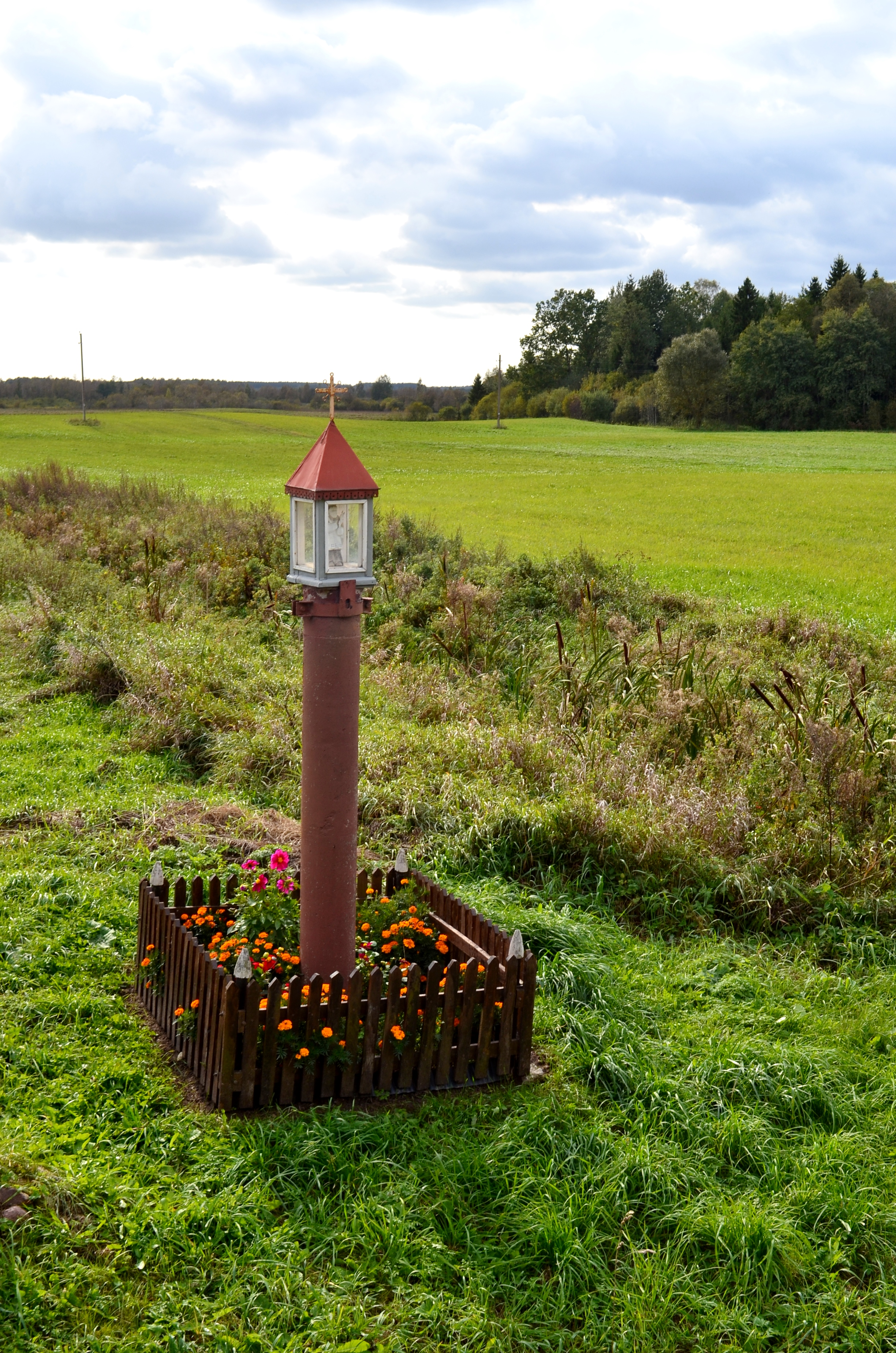 Koplytstulpis (Ñaujieji Kalniškiai), Telšių raj.